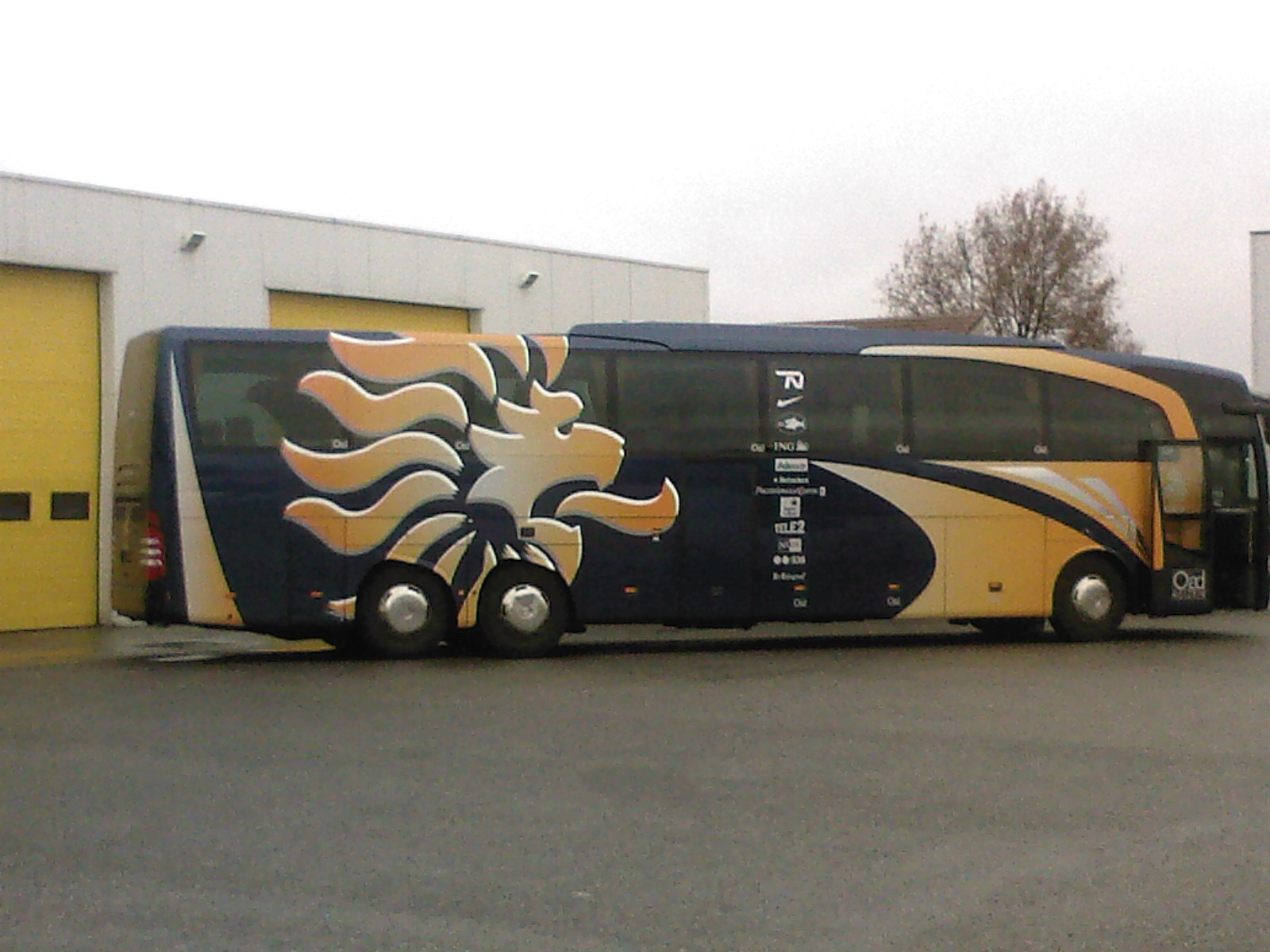 knvb-spelersbus in Hoogeveen